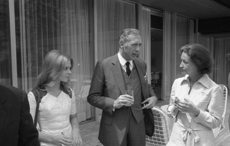 Bundeskanzler Willy Brandt empfängt Filmschauspieler Information added by Wikimedia users.